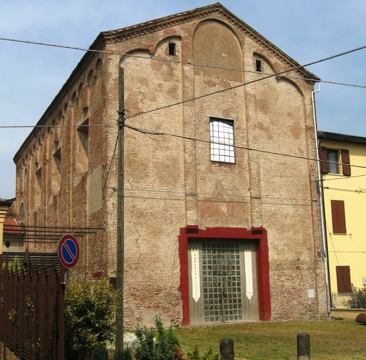 Vecchia Abbazia di San Michele a Poggio Renatico. In stile romanico, è stata costruita prima del 1200.